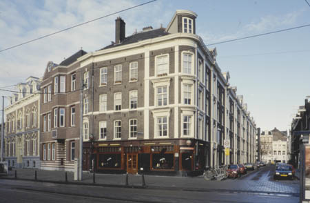 Woonblok Vereeniging ten behoeve der arbeidersklasse (1869-1870) Huidekoperstraat 2-18, Weteringschans 265-267, Falckstraat 8 Amsterdam P.J. Hamer - Rijksmonument